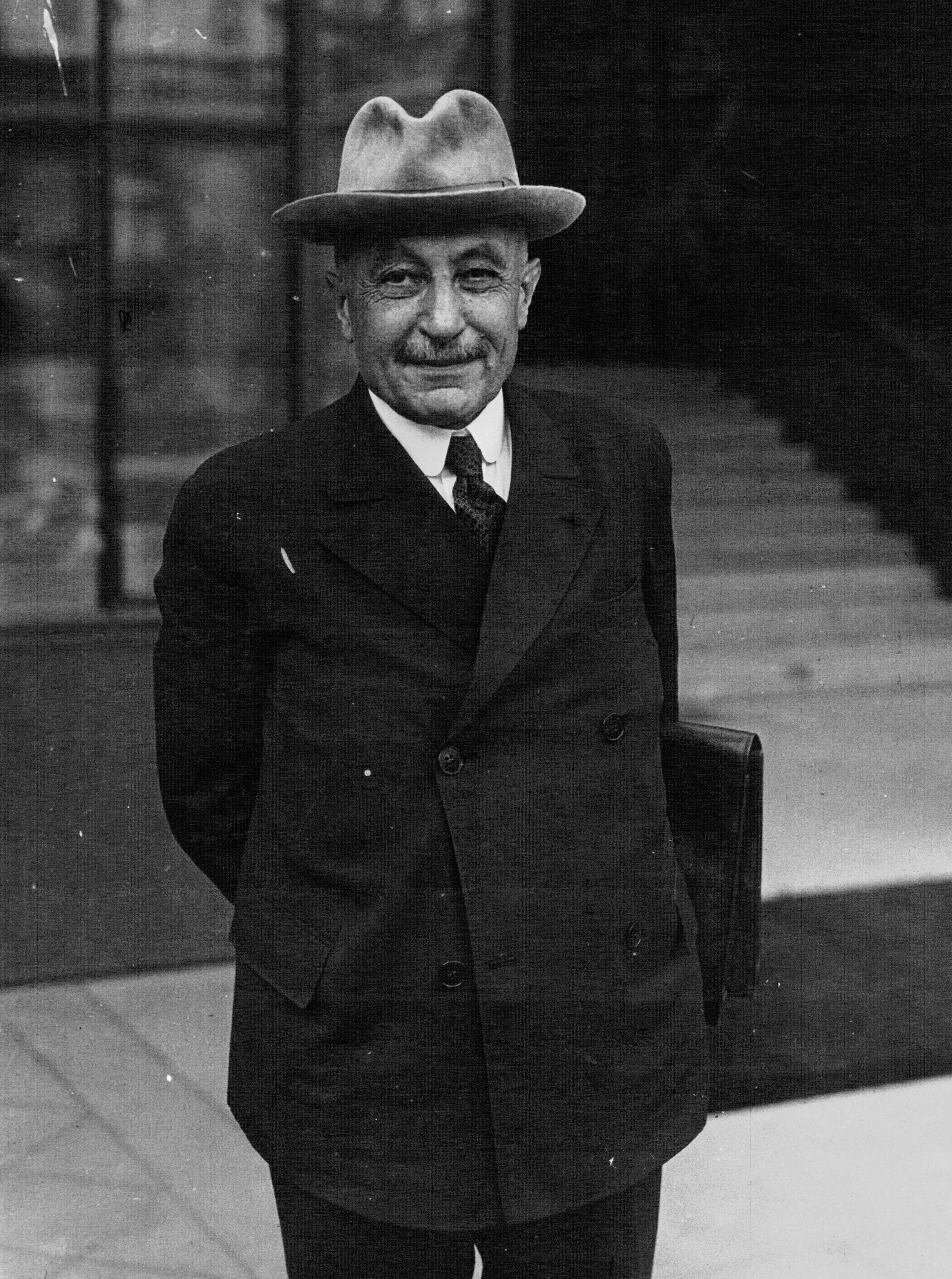 Sortie de l'Elysée : Germain Martin (portrait) [photographie de presse]